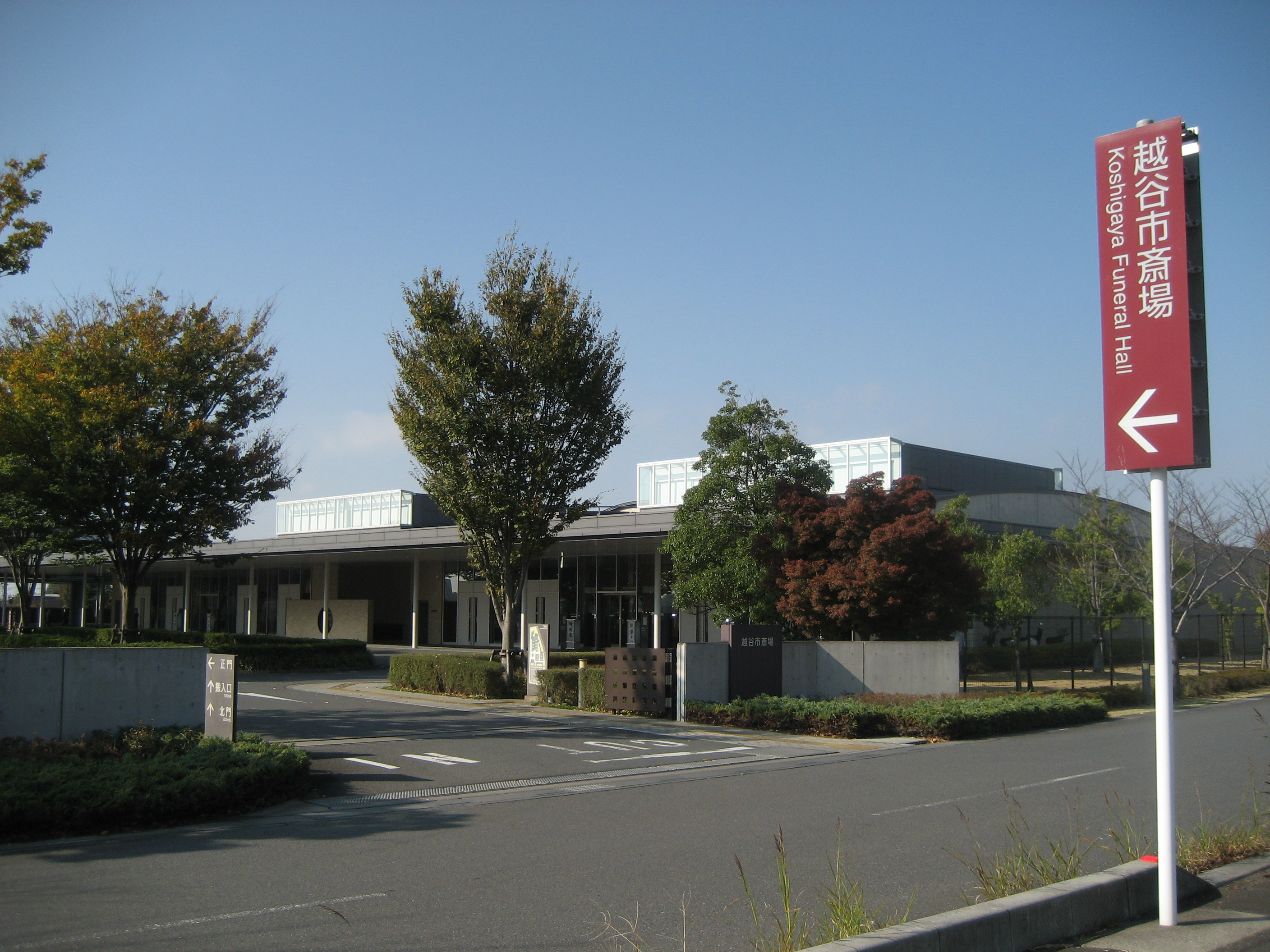 埼玉県越谷市にある越谷市斎場